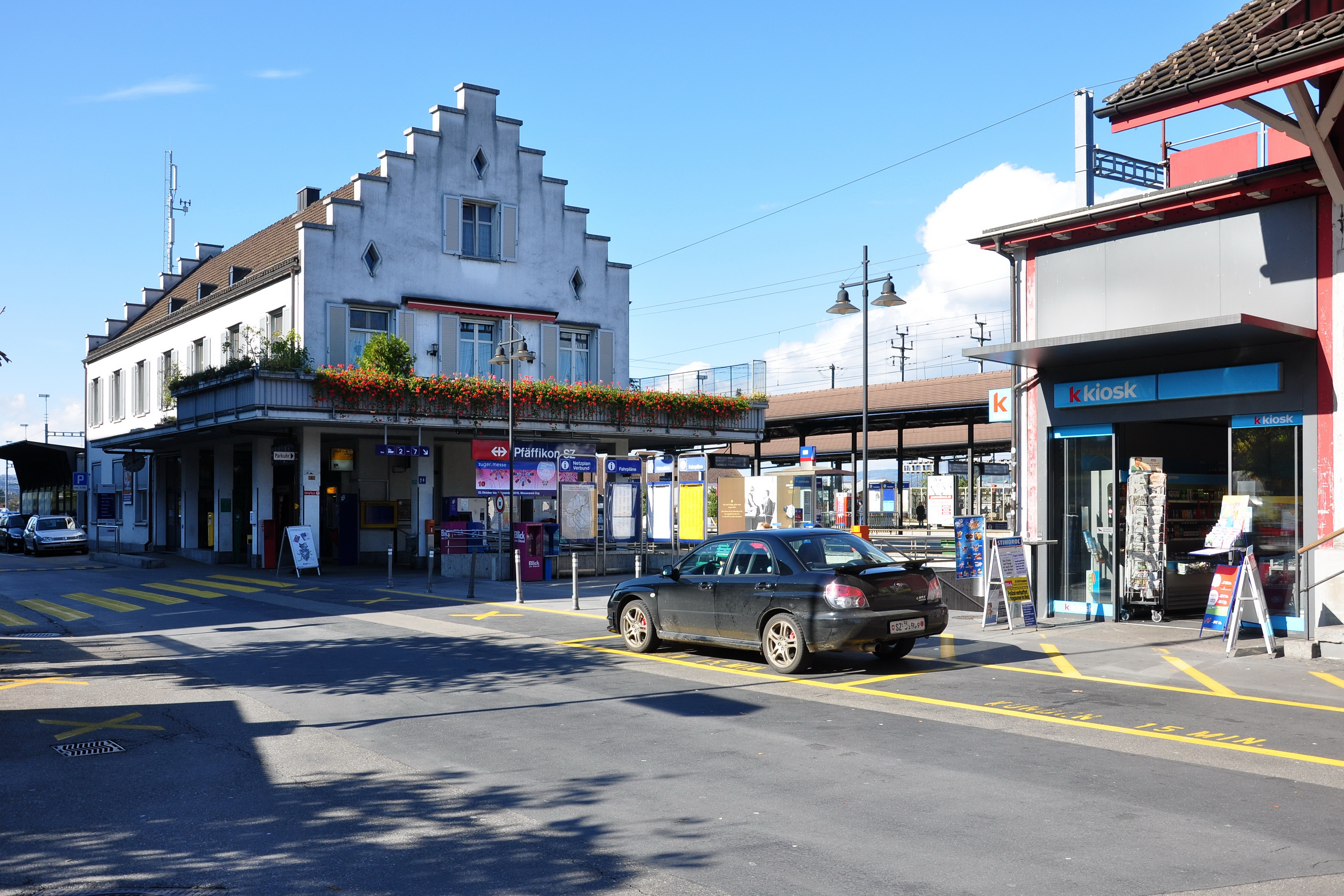 Bahnhof in Pfäffikon (SZ)